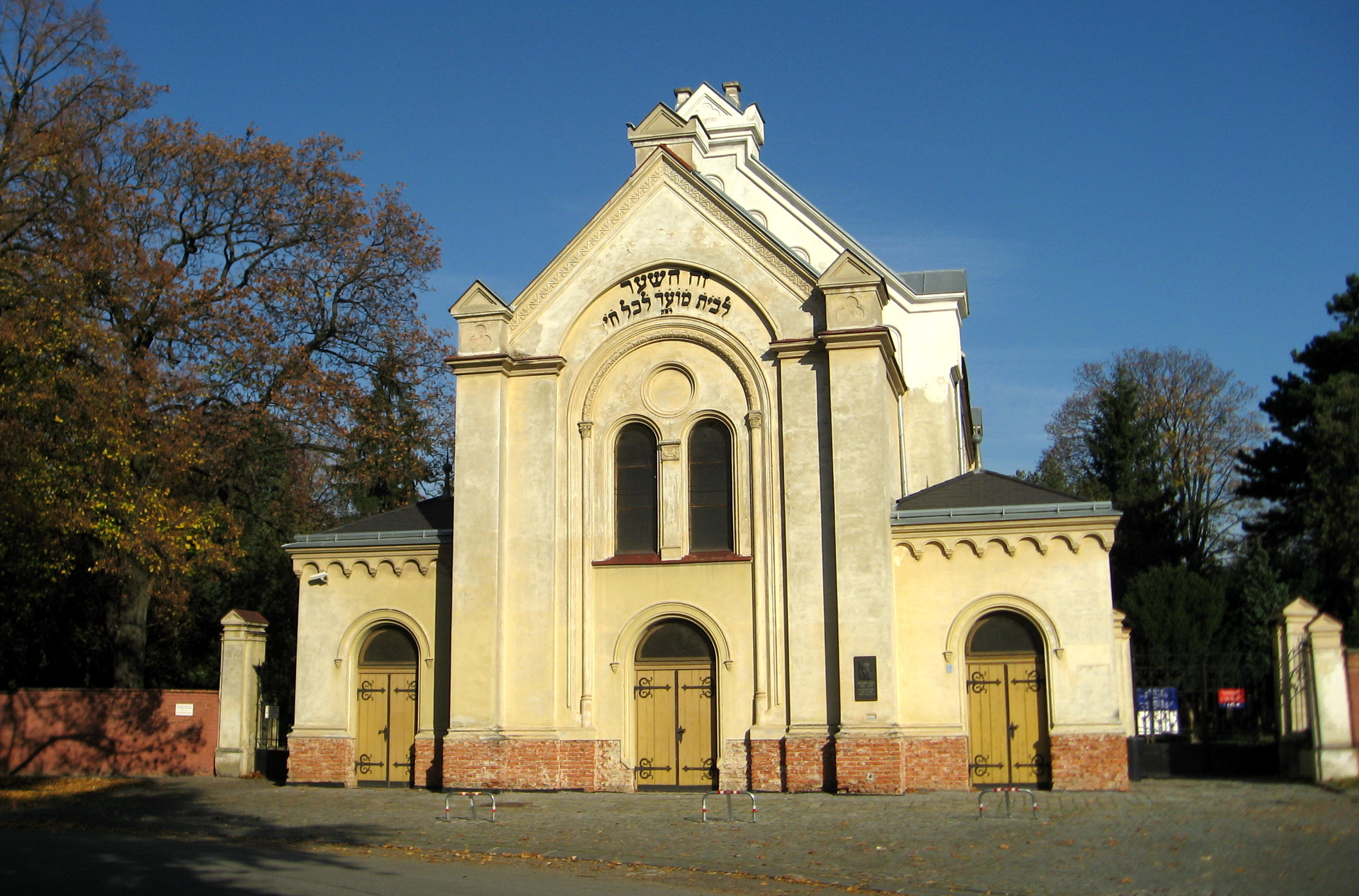 Židovský hřbitov